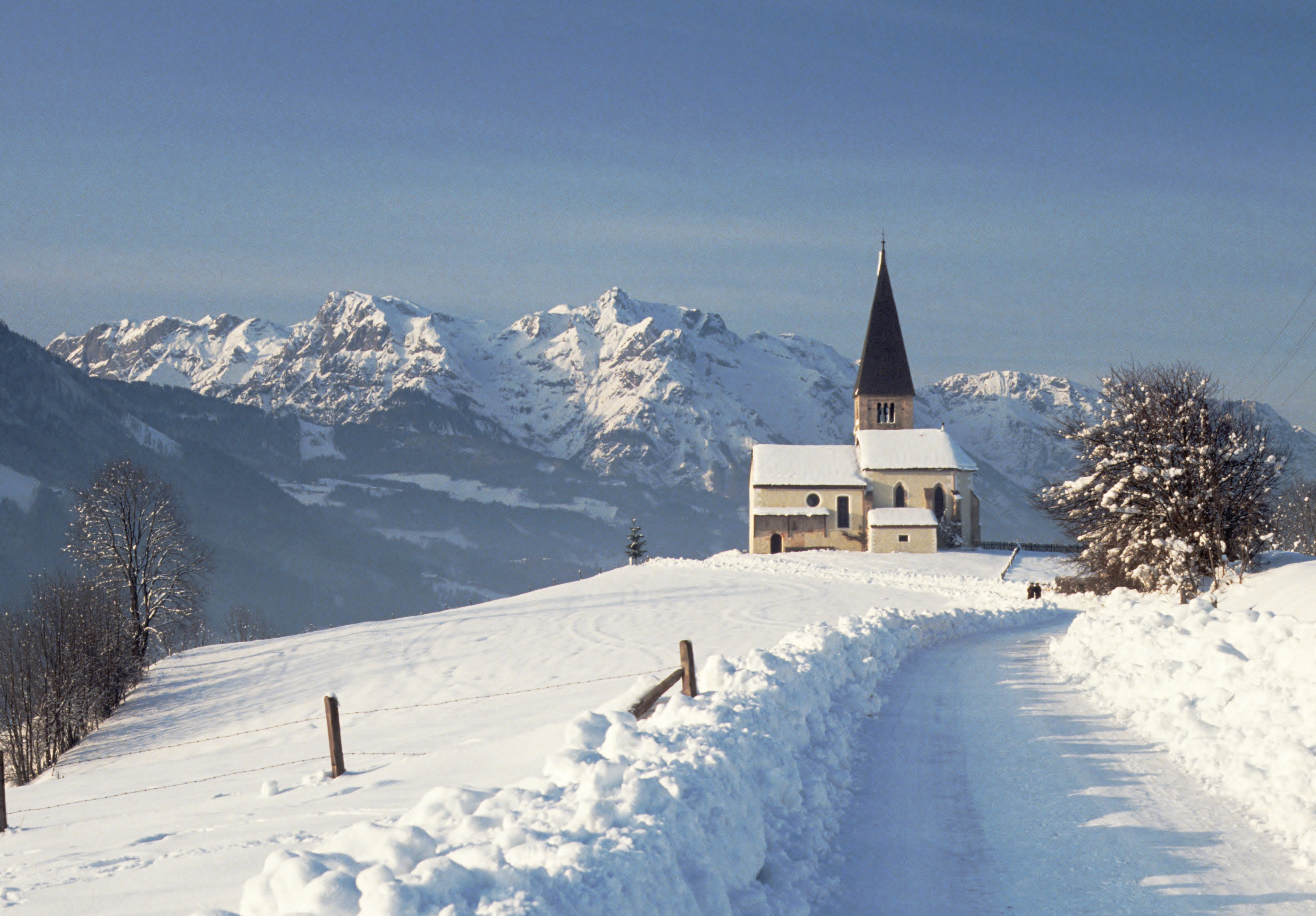 Buchbergkirche. Im Hintergrund das Hagengebirge